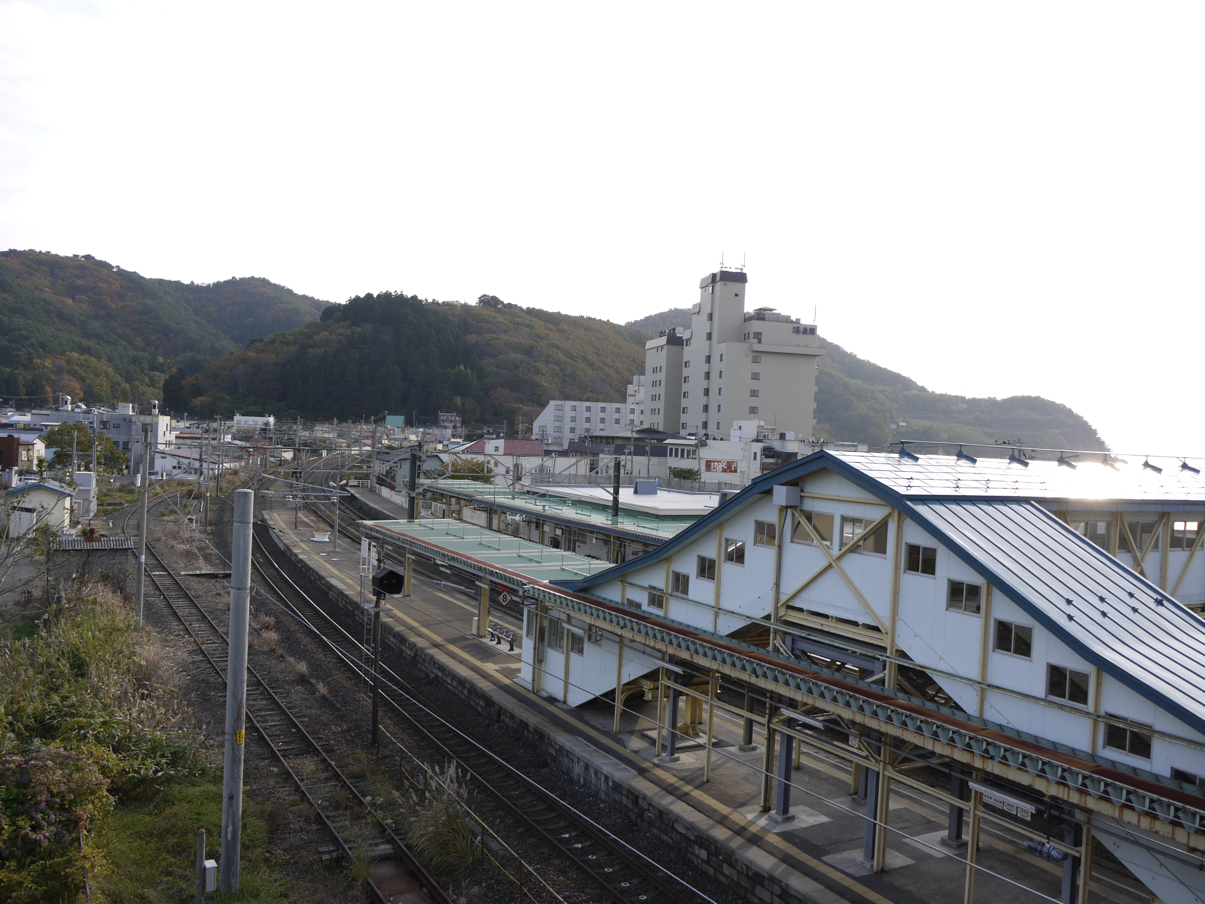 浅虫温泉駅（撮影当時はJR東日本・東北本線の駅）